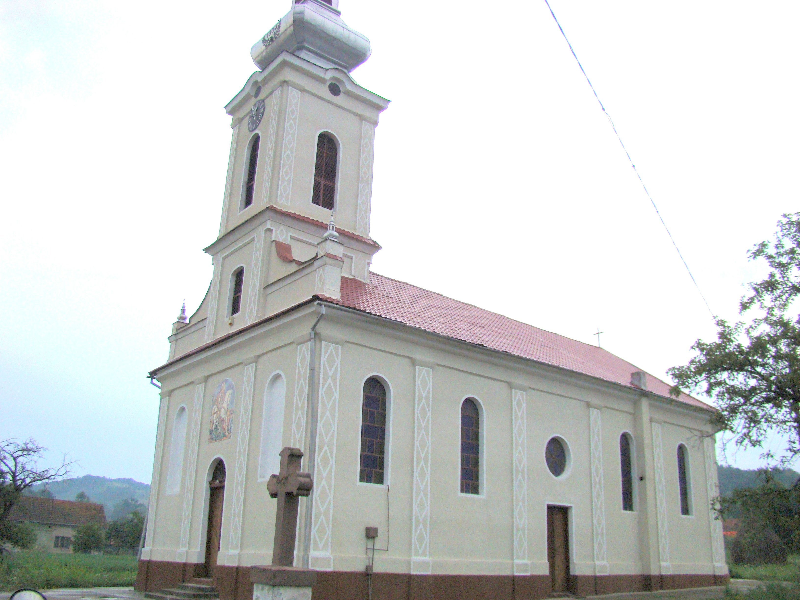 Biserica „Sf. Mucenic Gheorghe” din Petriș, Arad